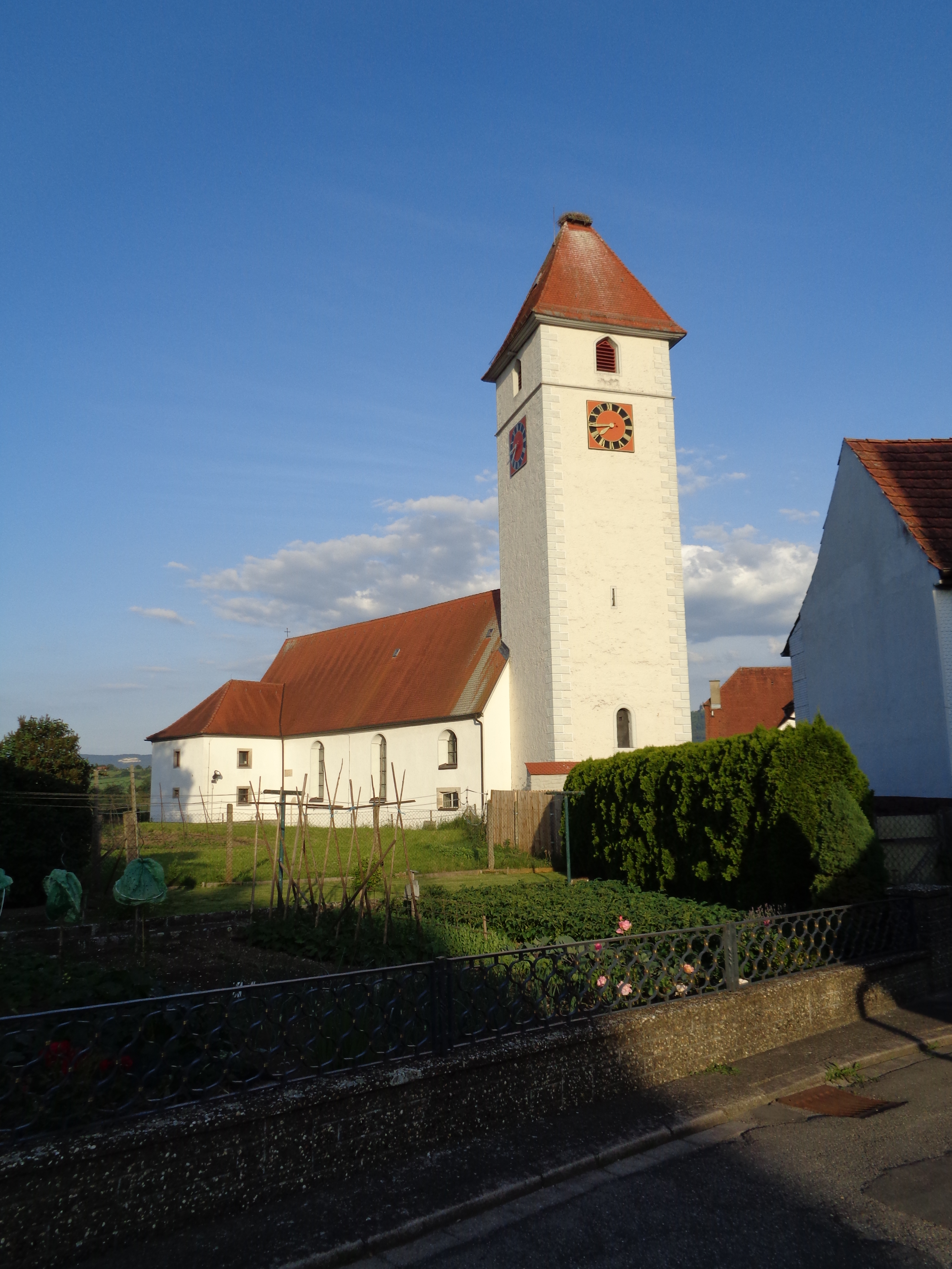 katholische Pfarrkirche St. Marien (Hechingen-Weilheim); Blick von Nordwest